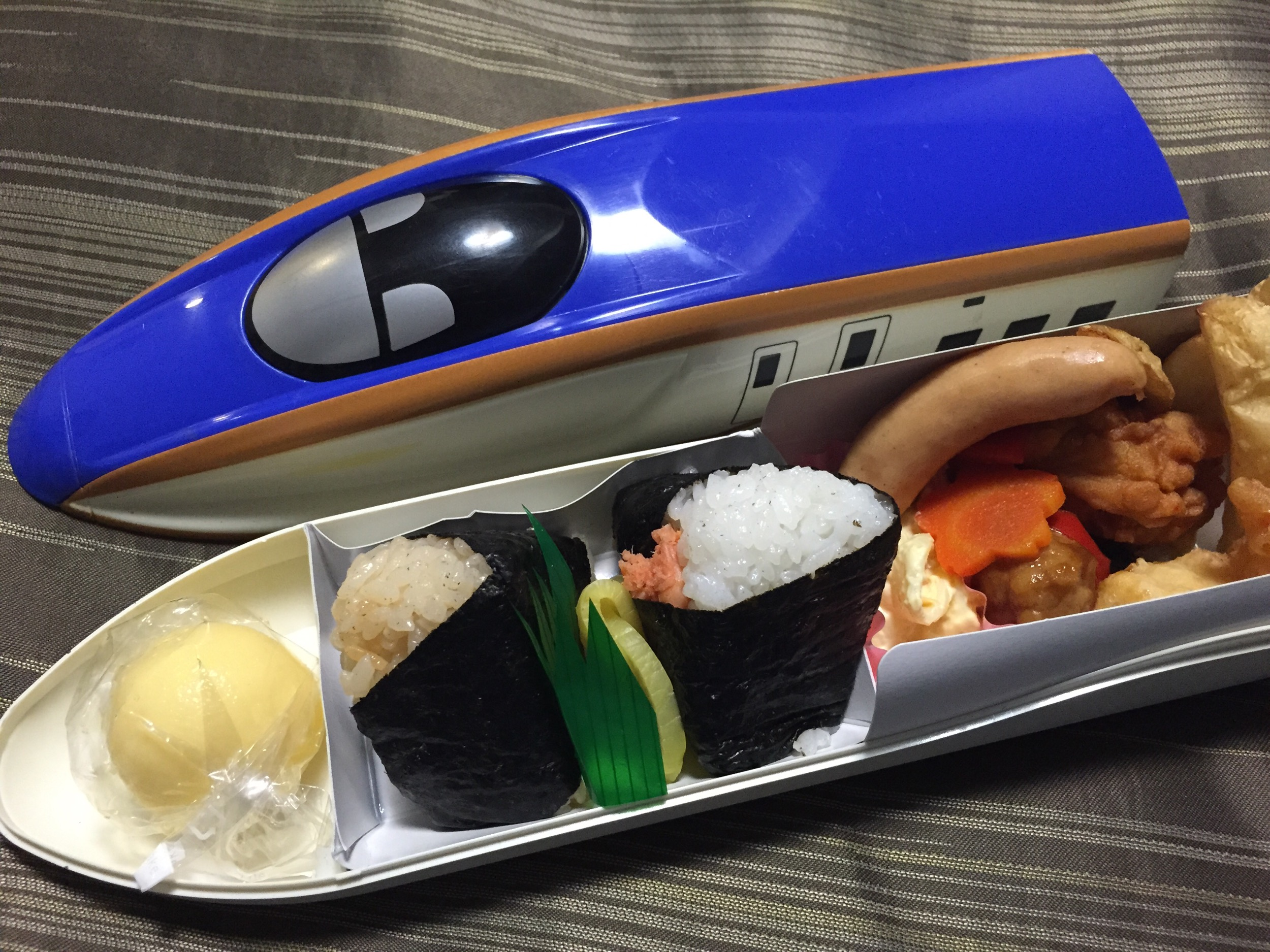 すべての写真-1150